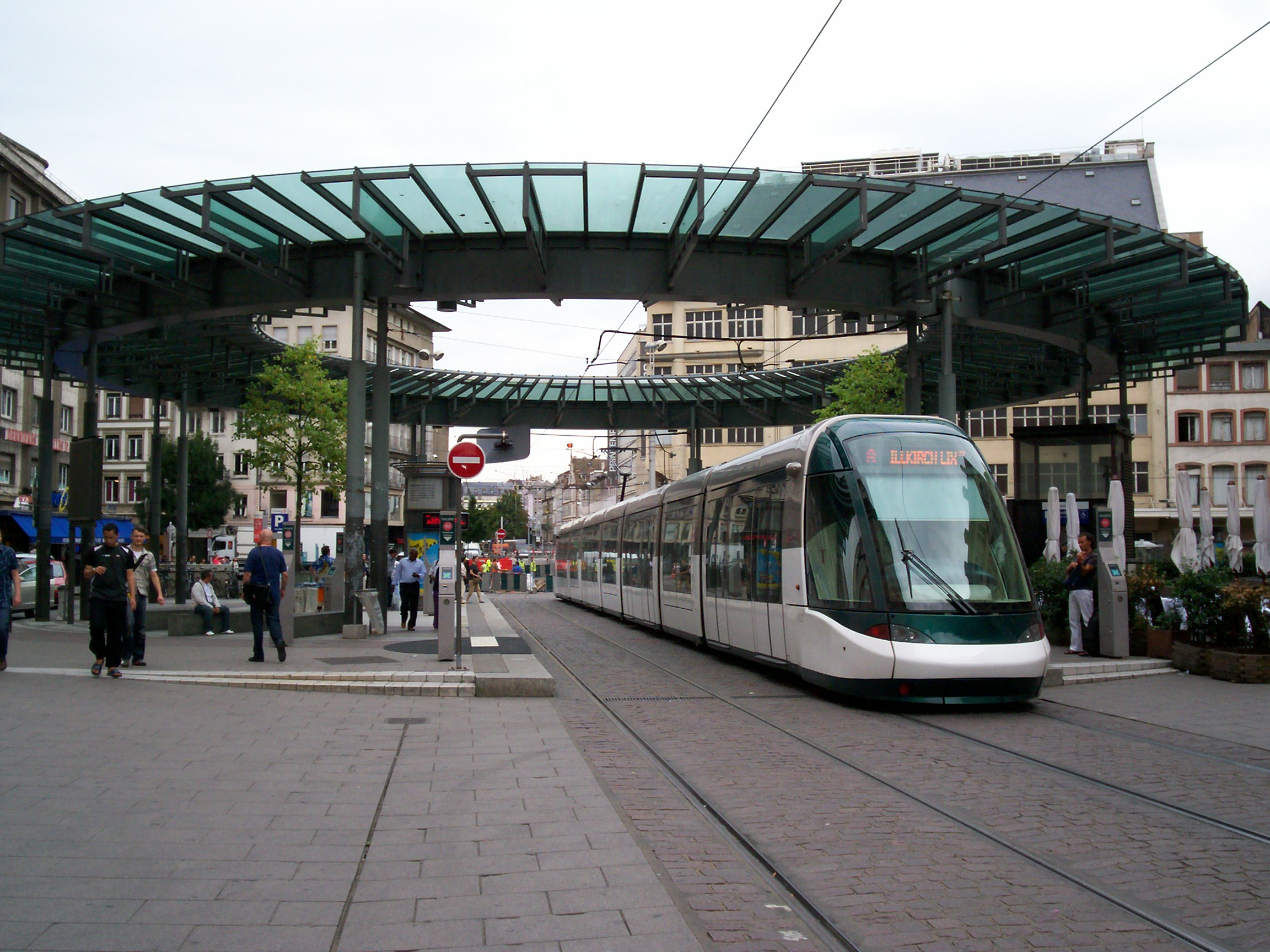 Tramway de Strasbourg ligne A à la station Homme de Fer pour Illkirch